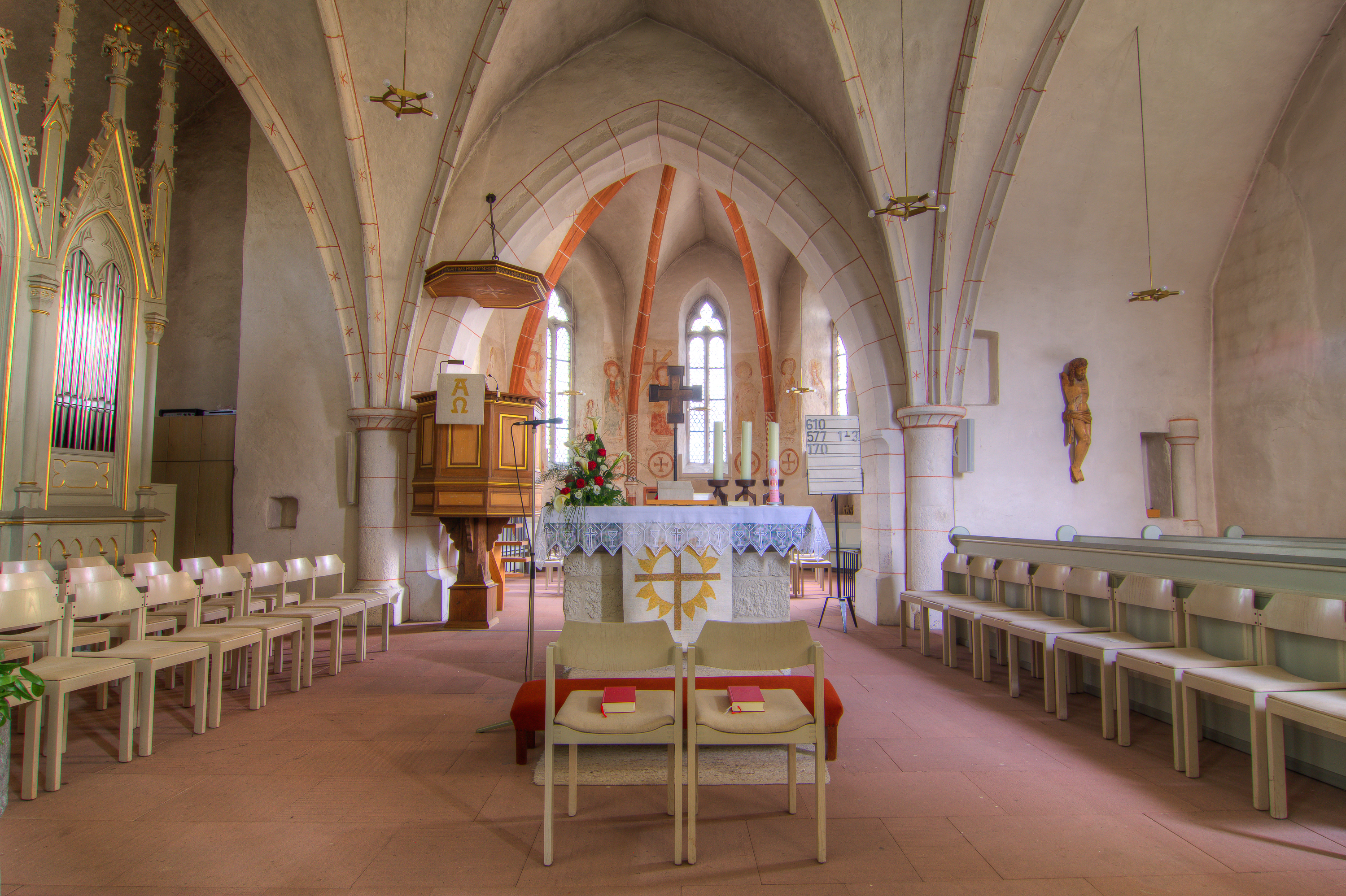 Evangelische Kirche Großen-Buseck, Landkreis Gießen in Hessen, Deutschland